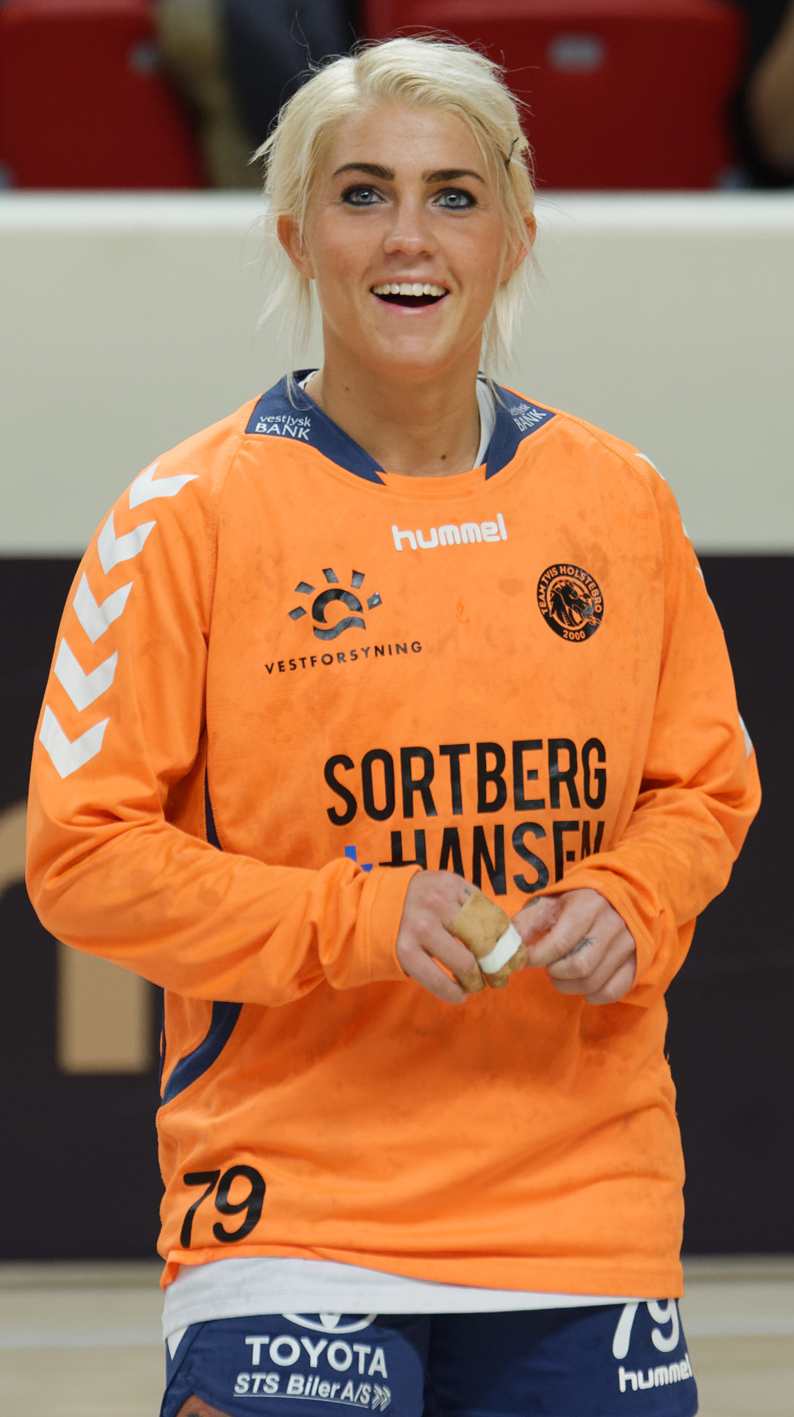 Rencontre de Coupe EHF entre Issy Paris Hand et les danoises de Team Tvis Holstebro. A Coubertin, le 13 mars 2015.